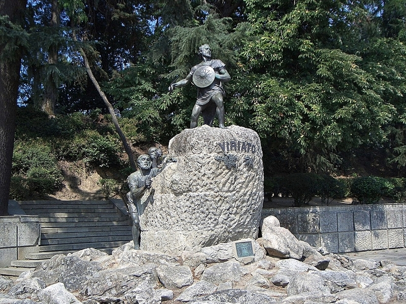 Viseu This file was uploaded for Wiki Loves Monuments in Portugal with the unique identifier 70458.